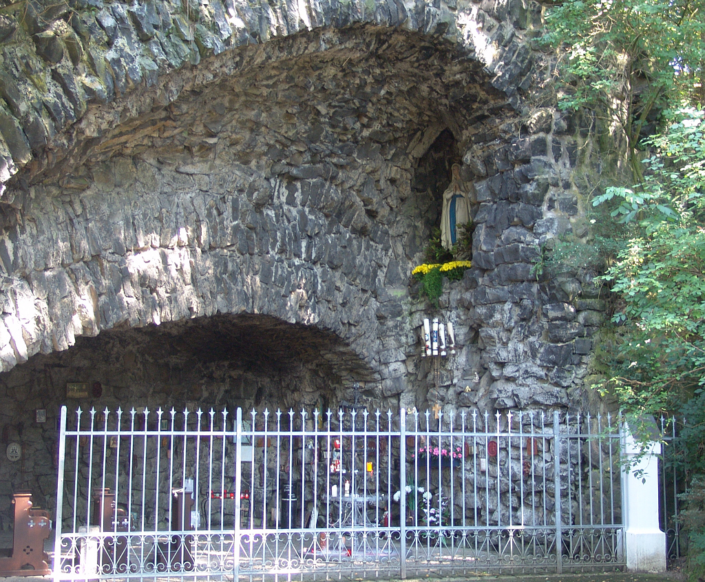 Die sogenannte Lourdesgrotte östlich von Waldsassen. Sie wurde der berühmten Grotte von Lourdes nachgebildet. (Foto von 2005)